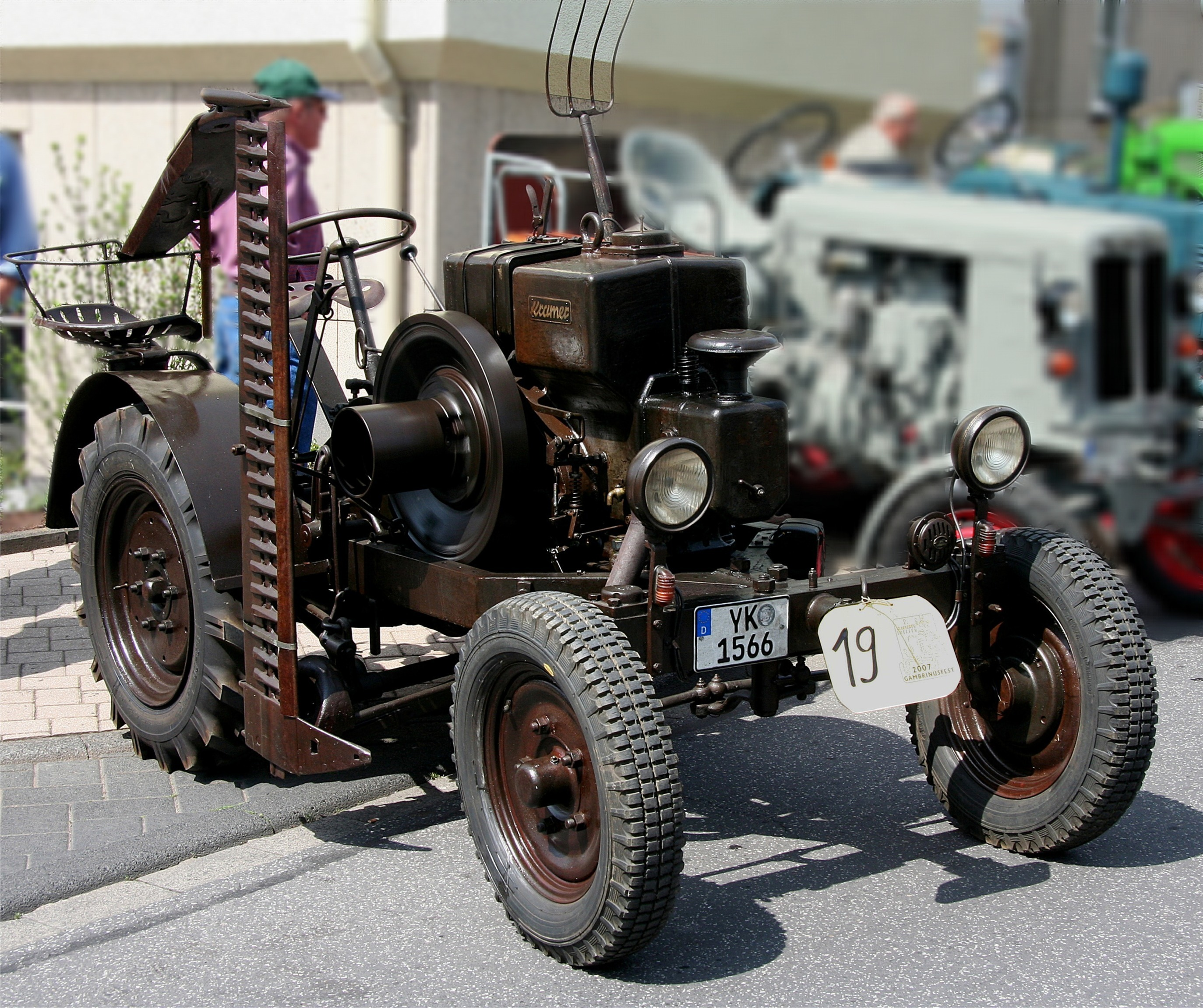 Kramer-Traktor K 18 (Baujahr 1937, 16-PS-Güldner-Motor) in Mendig; Kennzeichen retuschiert